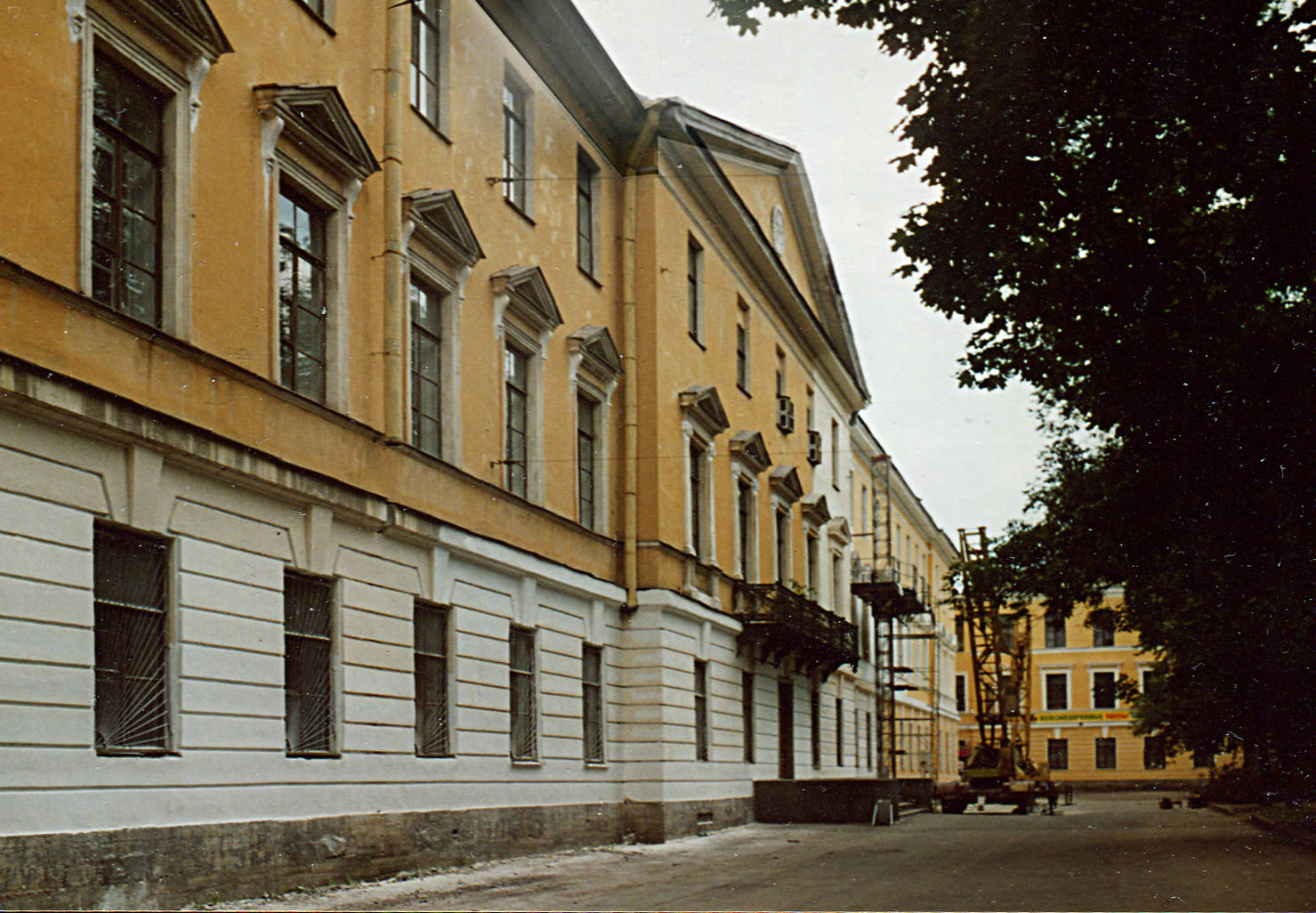 Kavalry_Nikolaevsky_school.Архитектор -Штауберт, Александр Егорович (178 - 1843)